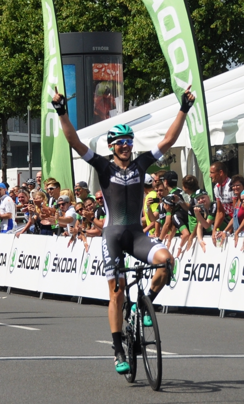 Gregor Mühlberger, Sieger von Rund um Köln 2017